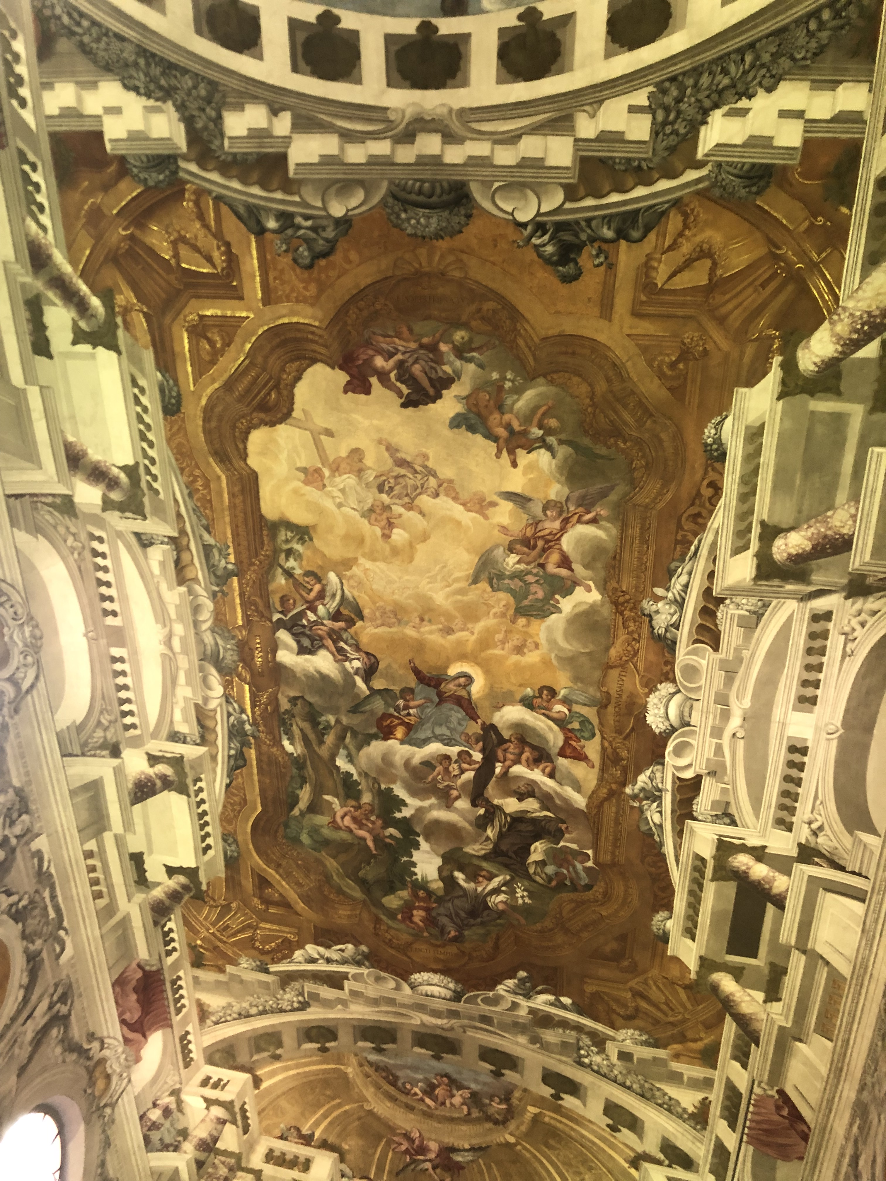 Udine - Chiesa del Carmine